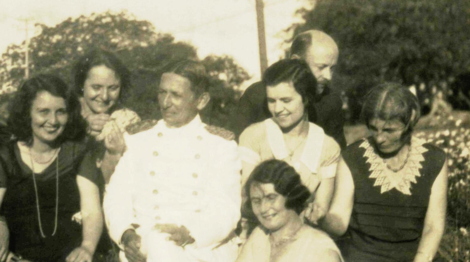 la primera de la derecha es Frieda, esposa del Gral. Manuel Rojas Acosta, Ministro de Guerra y Marina del Paraguay en la década de 1920 al 30, en el centro de uniforme, el Gral. Rojas Acosta